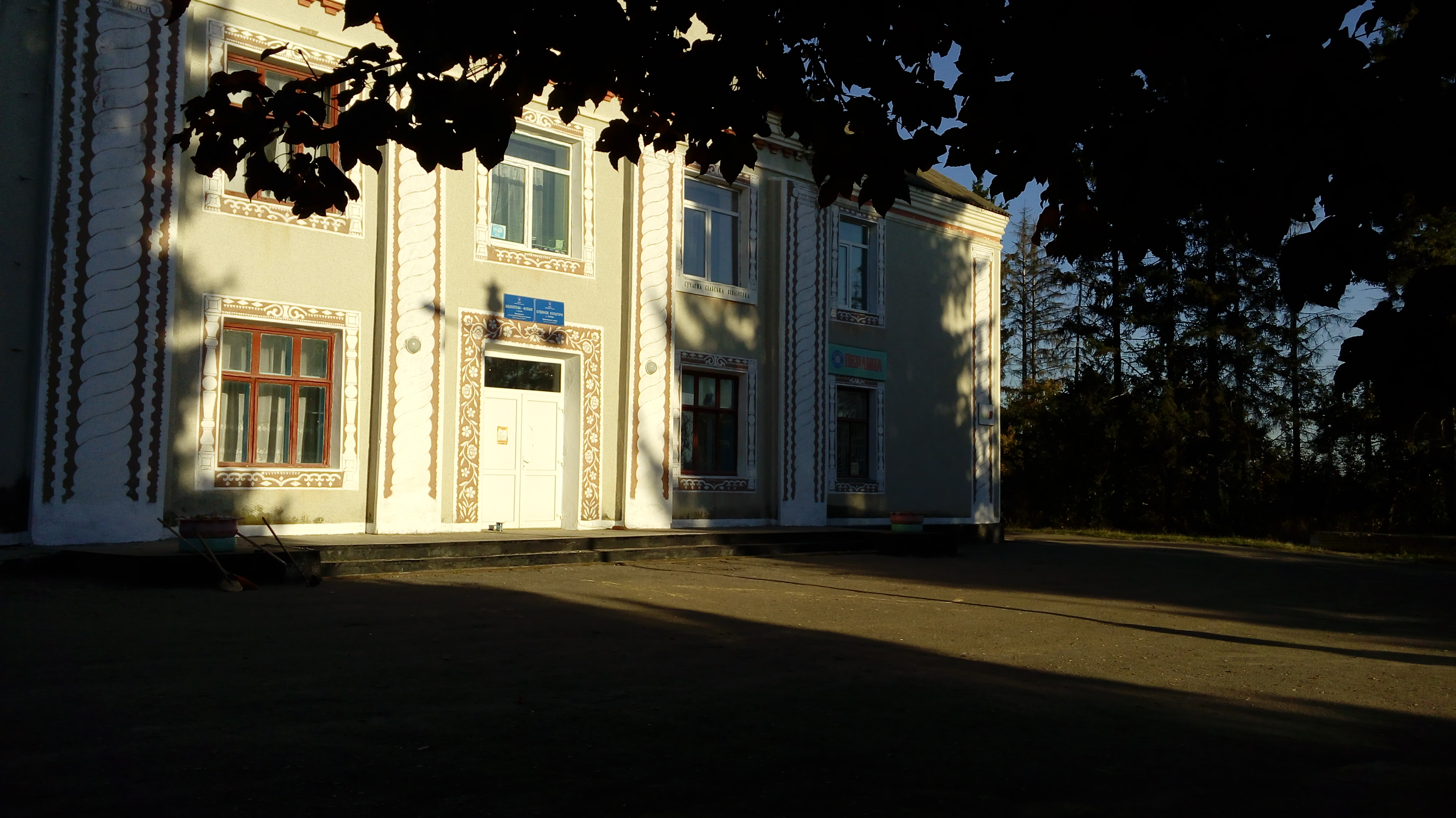 Сутковецька сільська бібліотека знаходиться на другому поверсі сільського будинку культури.